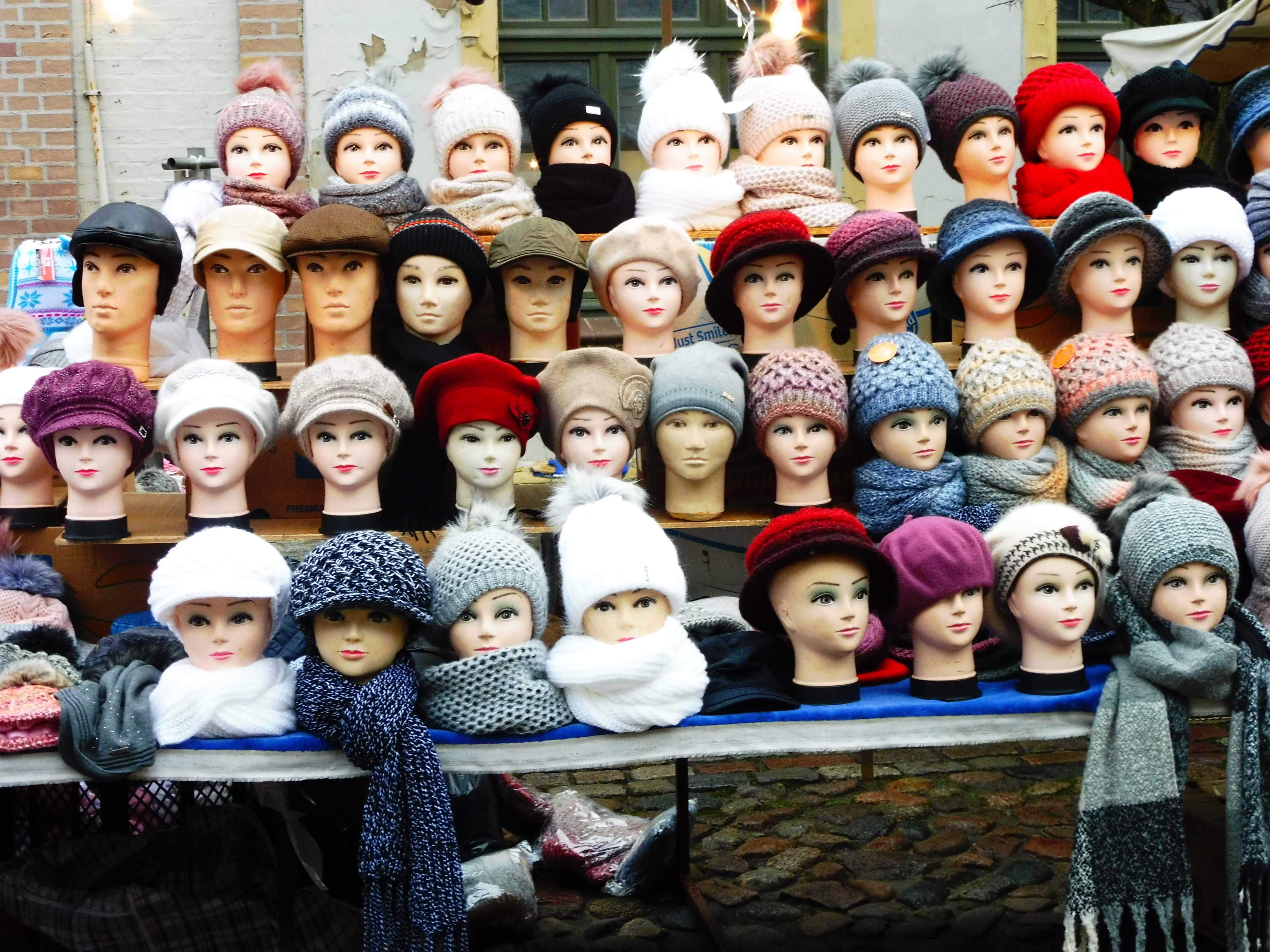 Mützenstand im vorweihnachtlichen Straßenverkauf